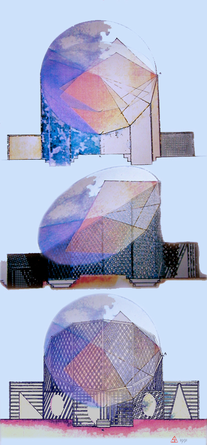 Projet de monument à la calmoduline, aquarelle, plume et infographie